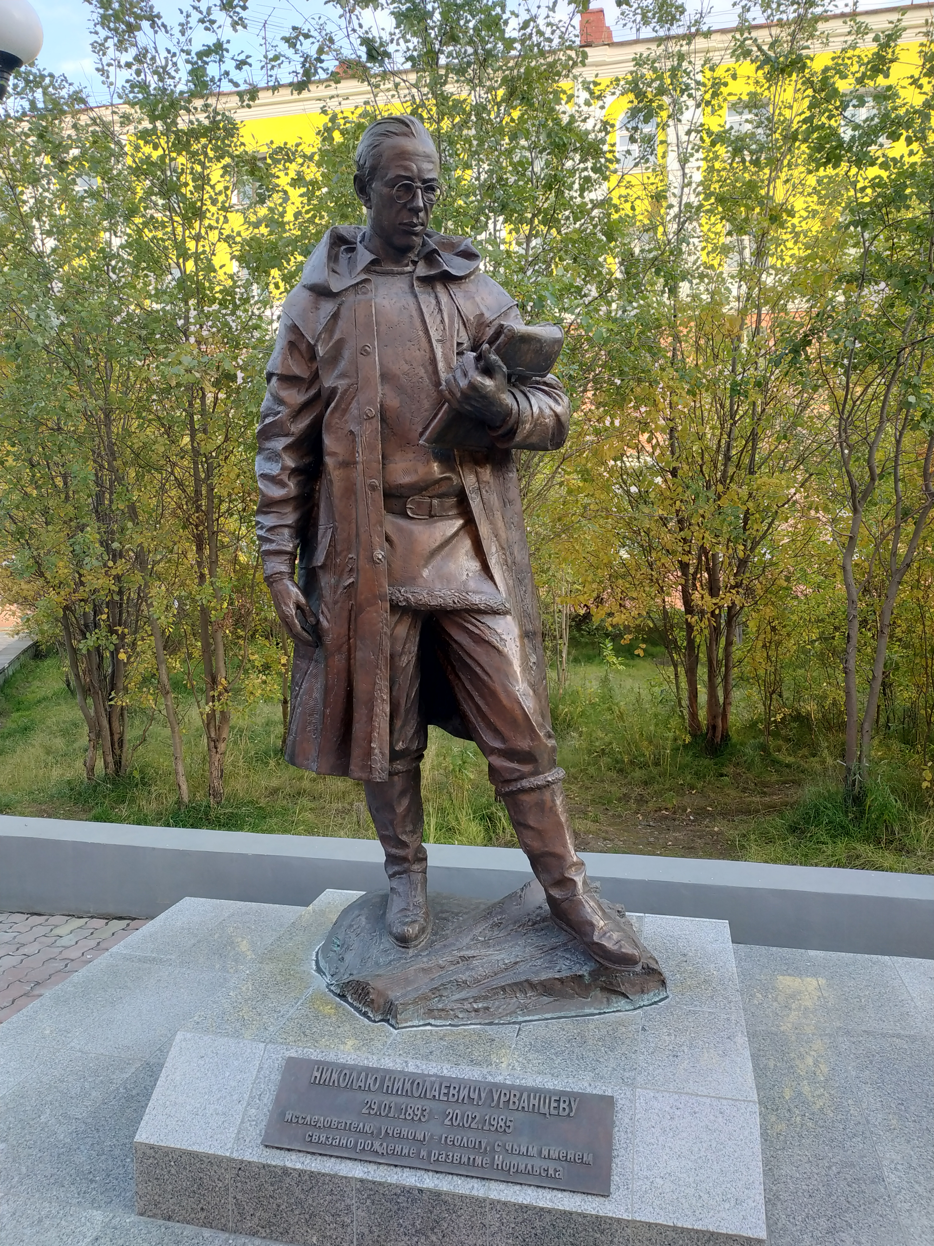 Памятник Н.Н. Урванцеву, установленный рядом с Музеем Норильска.